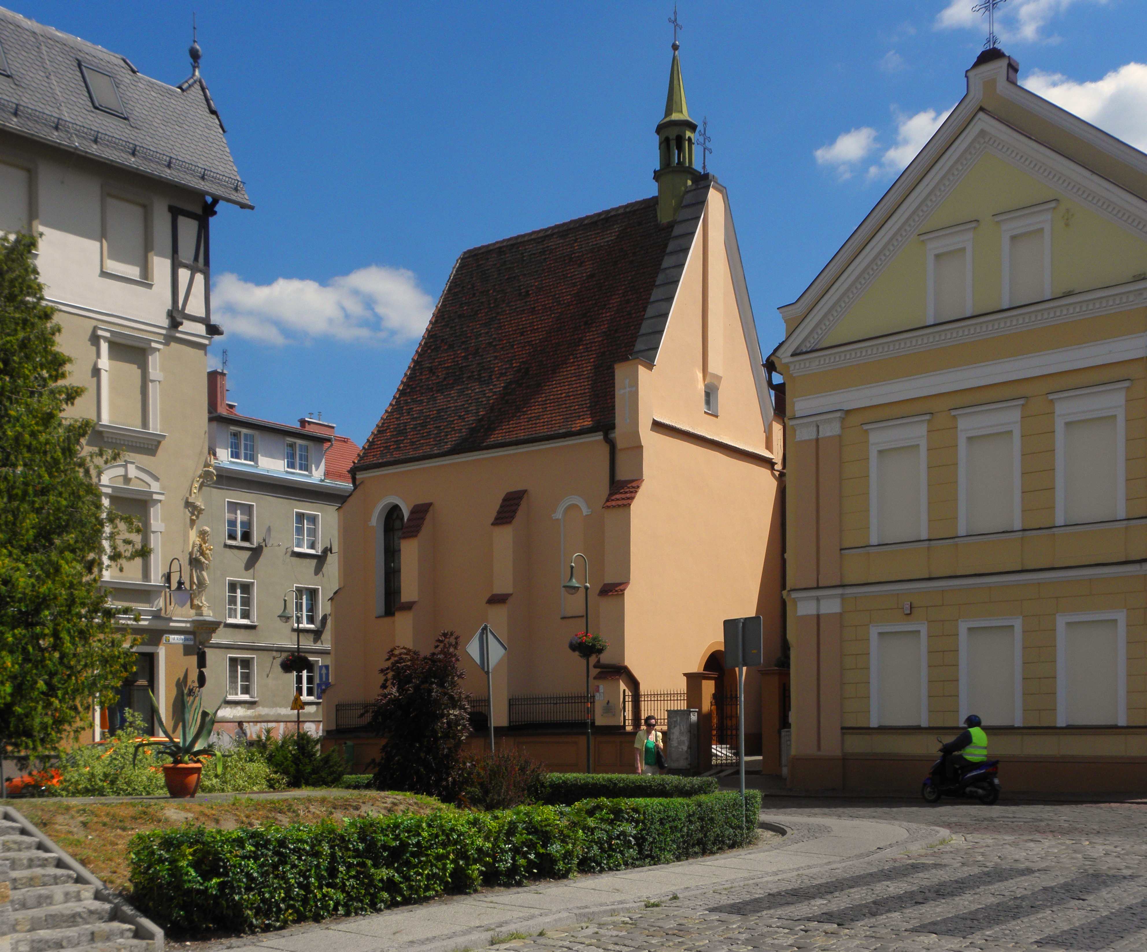 Opole, kaplica szpitalna p.w. św. Aleksego, 1421, kon. XVII, XVIII